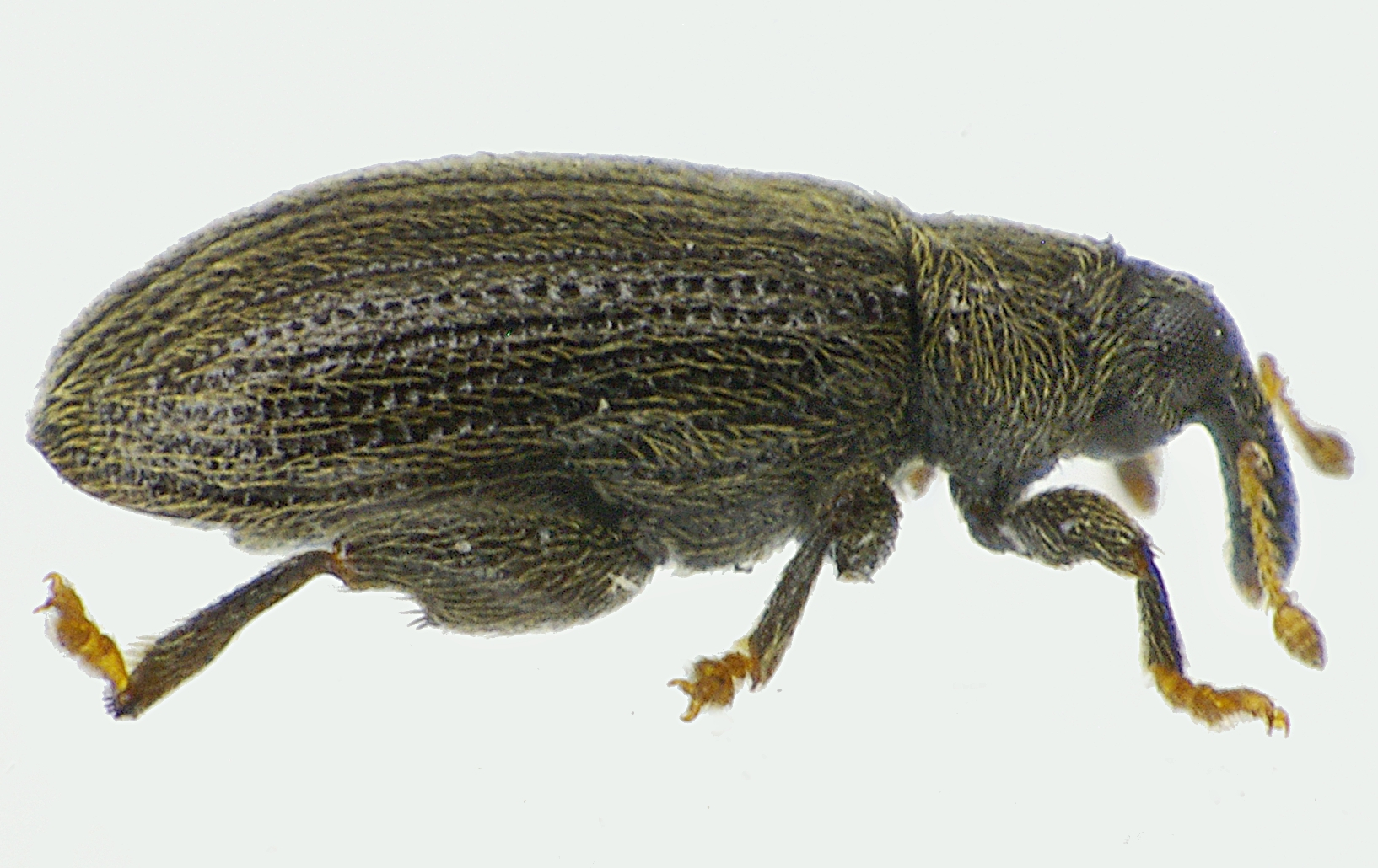 Orchestes fagi von Süddeutschland, Schwäbische Alb bei Tuttlingen am 27. Februar 2014